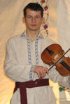 Михайло Качалов